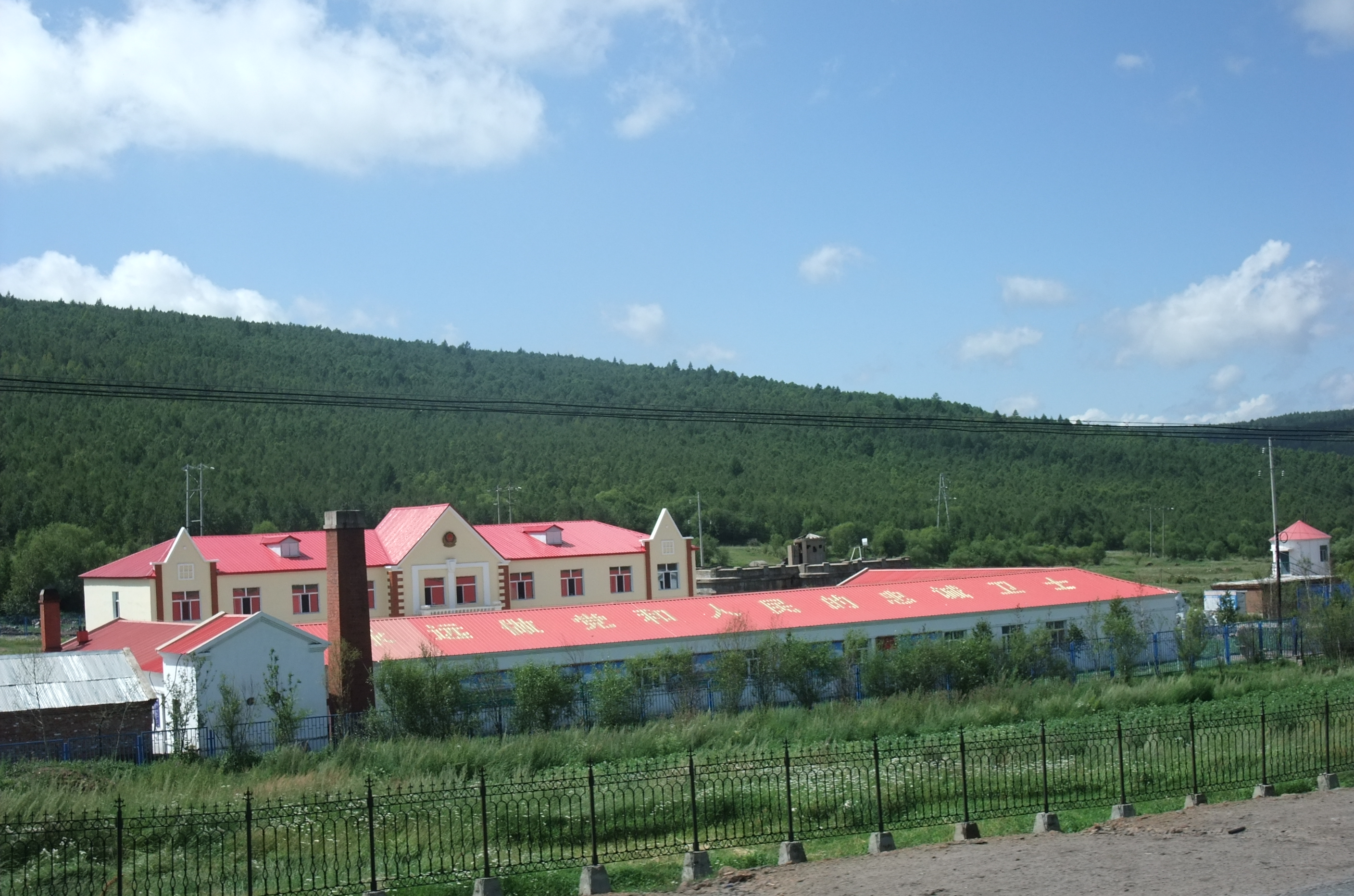 内蒙古自治区兴安岭站